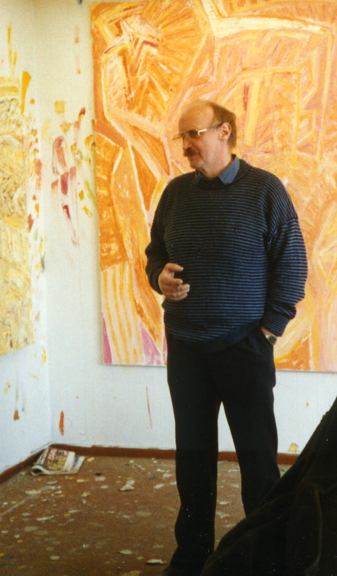 Le peintre norvégien Kjell Pahr-Iversen en 1997